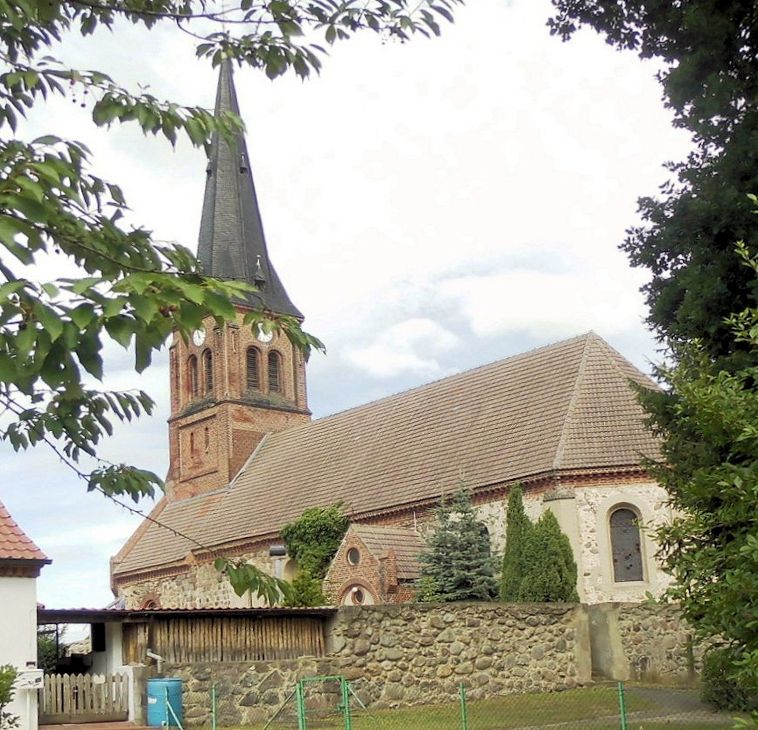 Dorfkirche in Wichmannsdorf, Gemeinde Boitzenburger Land, Landkreis Uckermark, Deutschland